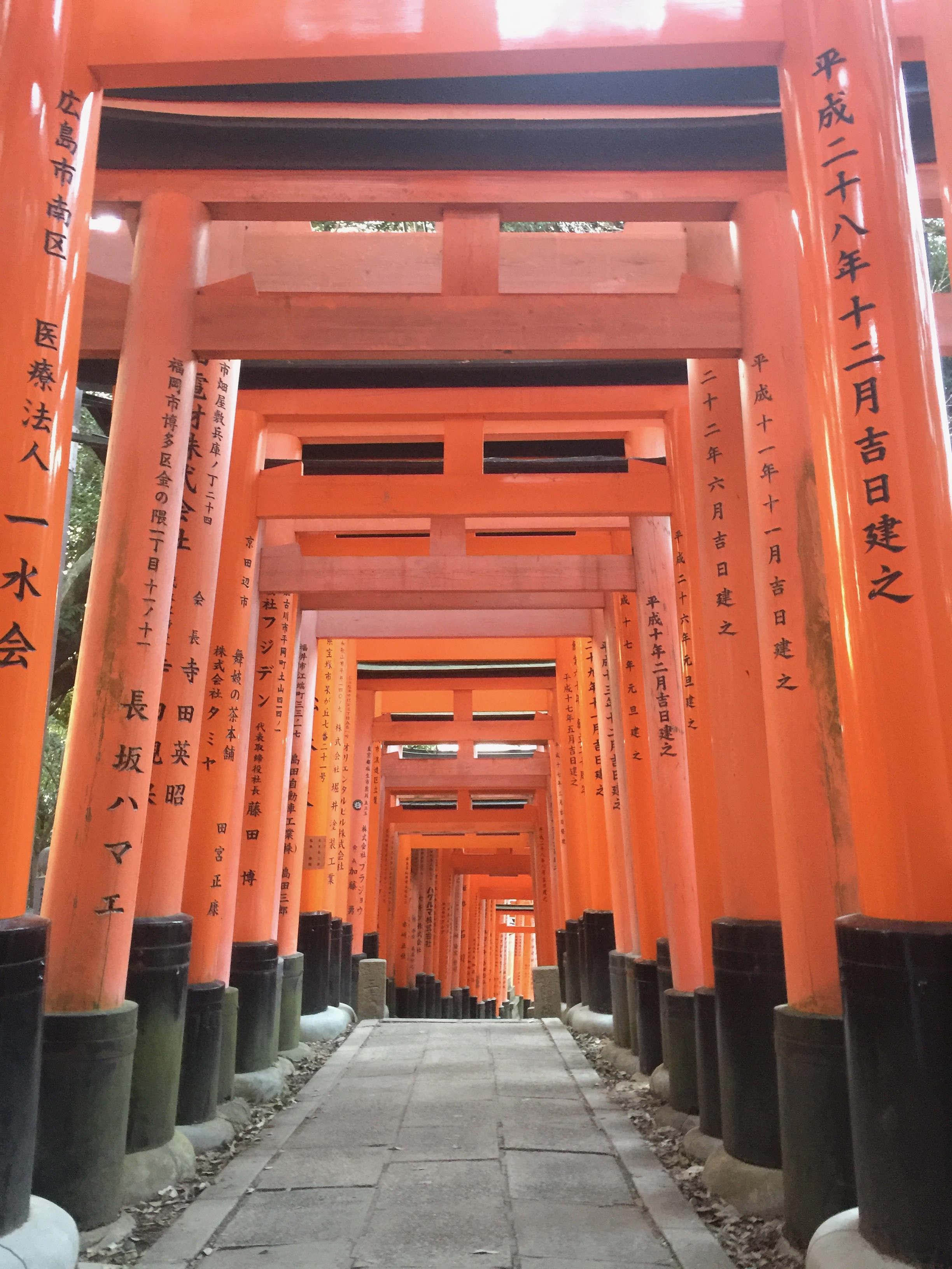 Fushimi és un dels onze salons de la ciutat de Kyoto, a la prefectura de Kyoto, Japó. Llocs famosos de Fushimi inclouen el Santuari Fushimi Inari, amb milers de torí que recorren els camins amunt